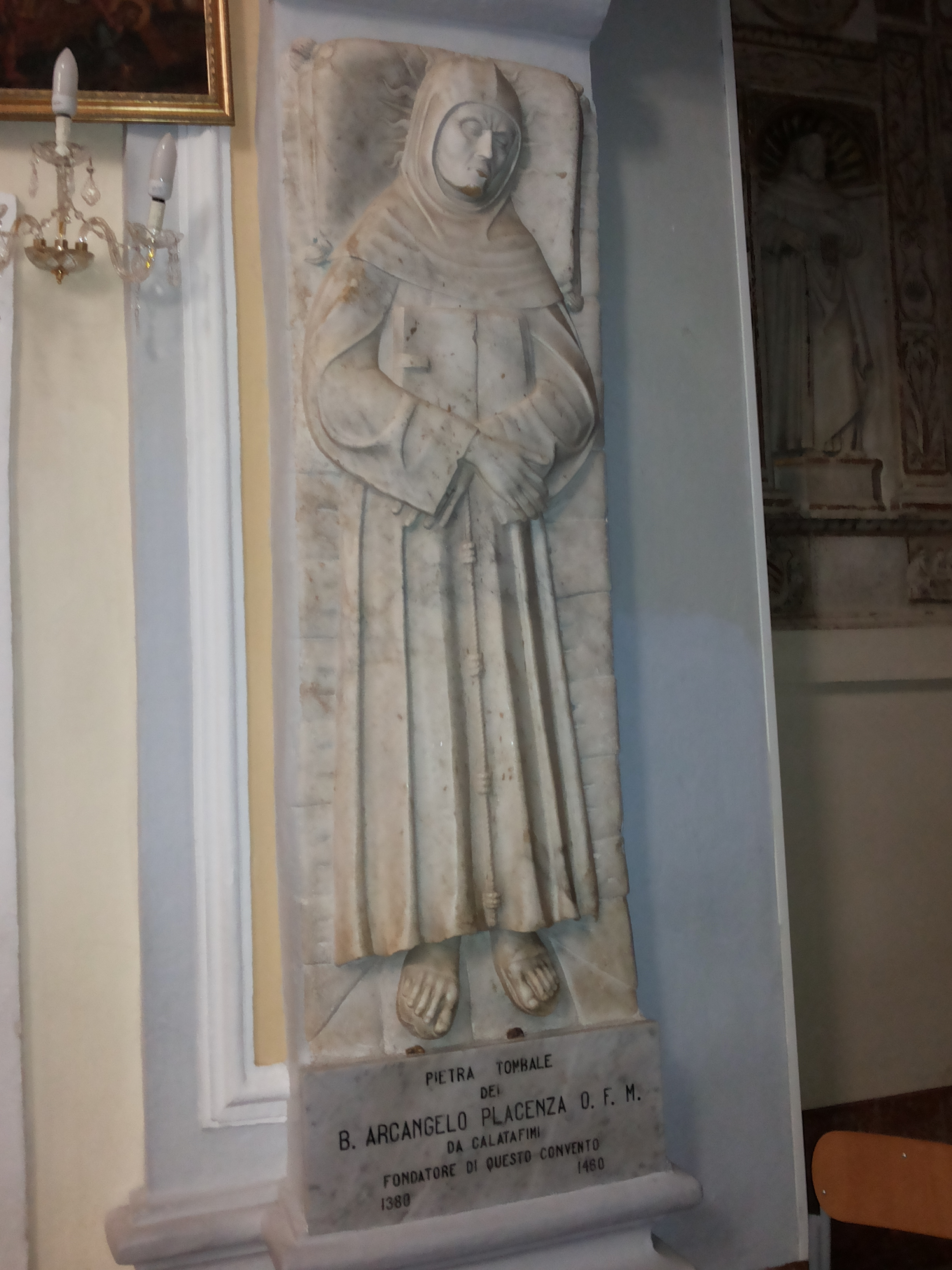 Beato Arcangelo Placenza da Calatafimi - Chiesa di Santa Maria di Gesù (Alcamo)